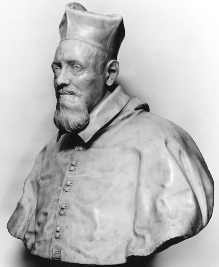 Busto del Cardenal Guido Bentivoglio